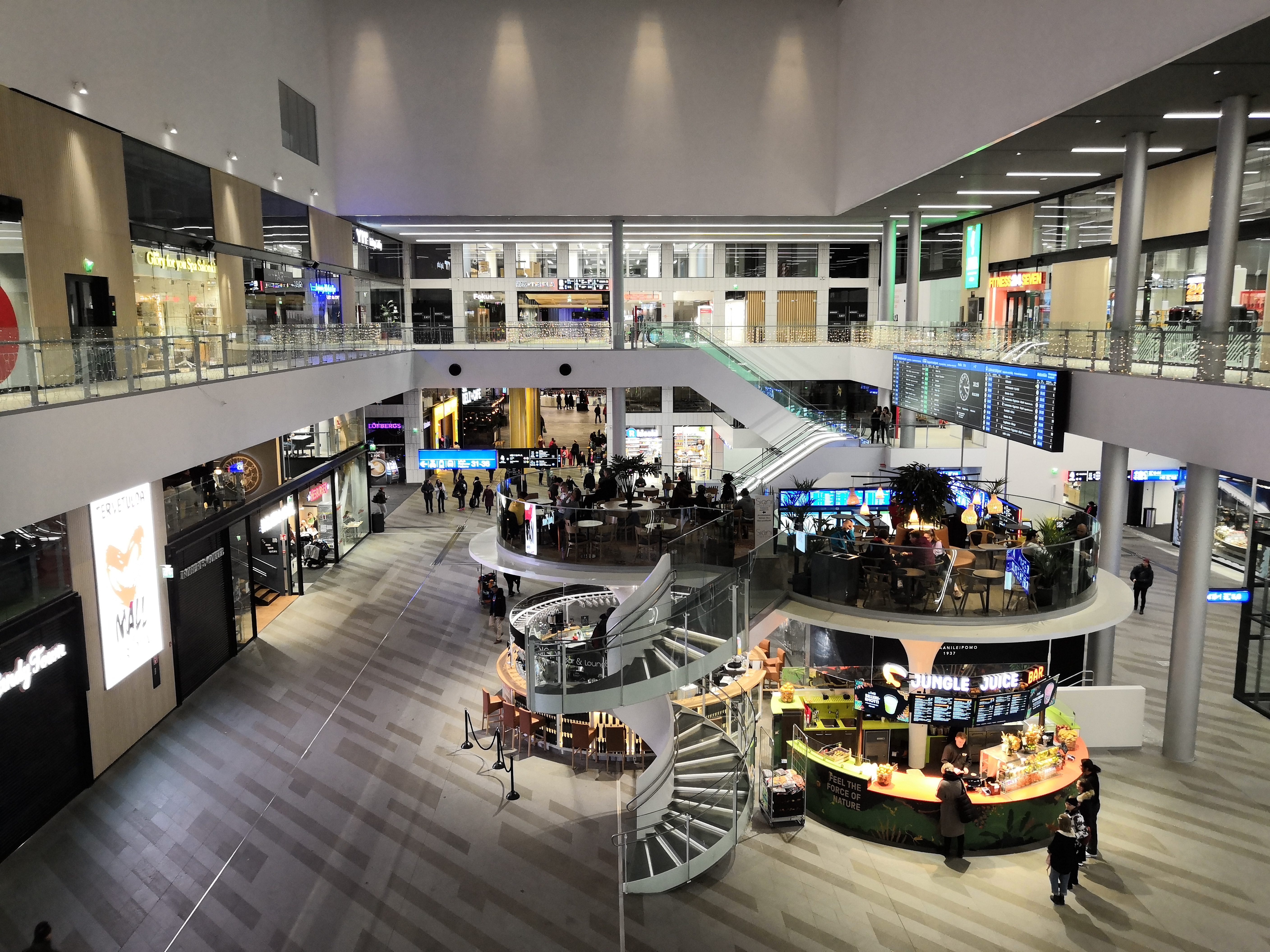 Kauppakeskus Mall of Triplan aula